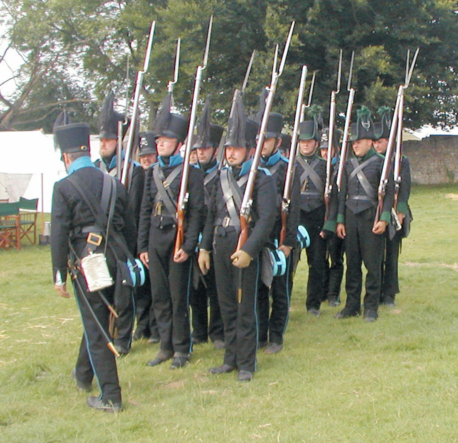 Photo : Section brunswickoise lors su bivouac 2008